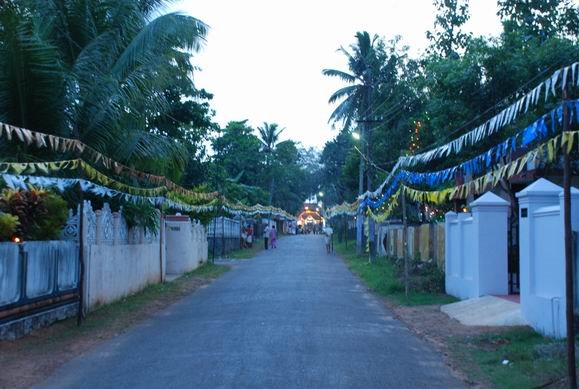 തിരുവെങ്കിടപുരംക്ഷേത്രജംഗ്ഷനിൽ നിന്നും വാഴപ്പള്ളിക്ഷേത്രത്തിന്റെ ദൃശ്യം